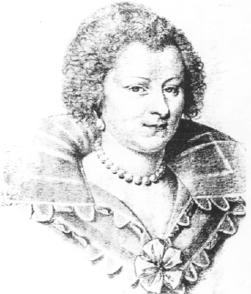 Madame de Sablé (1599-1678)